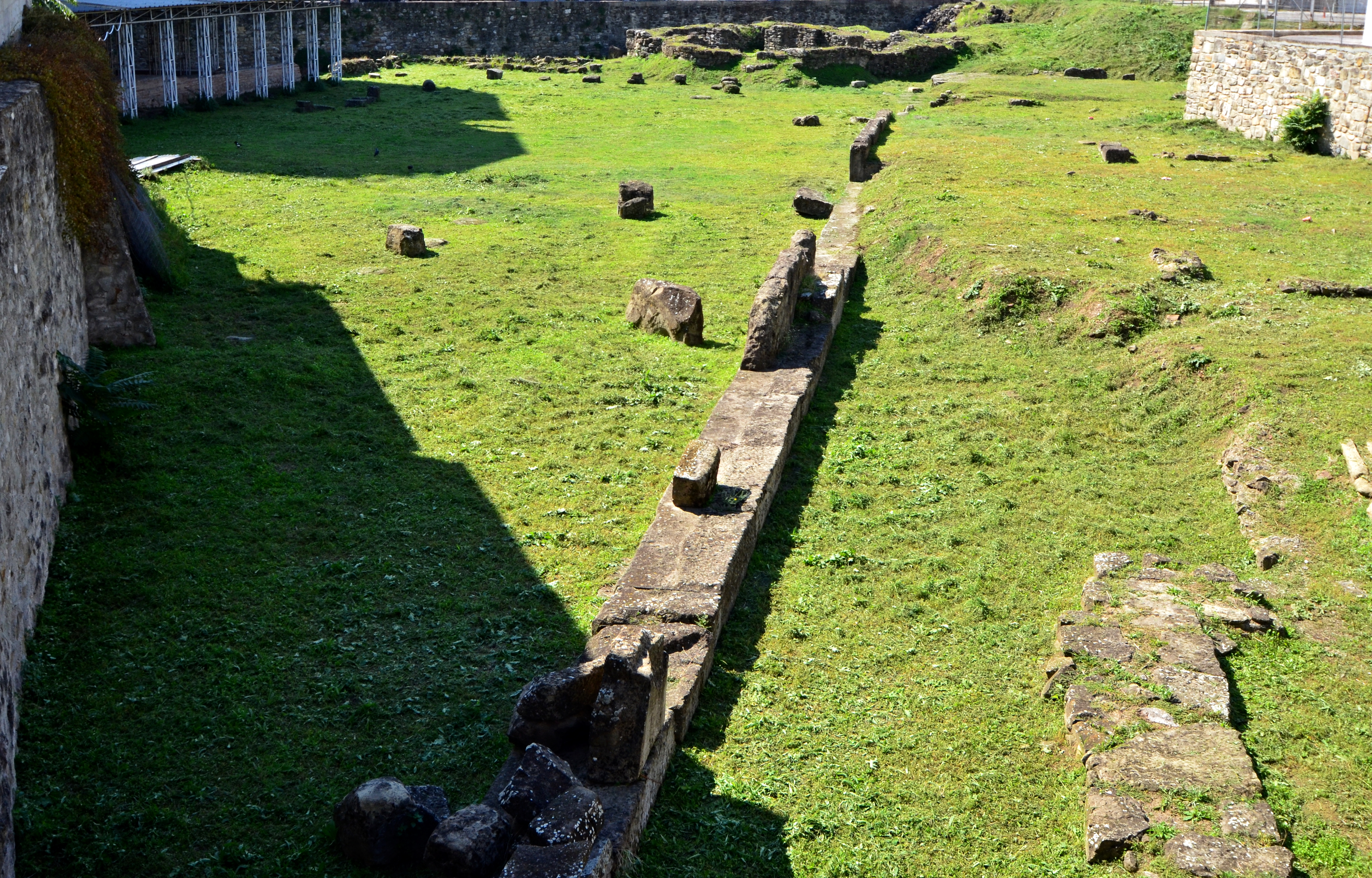 Ασκληπιείο Τρικάλων«Βυζαντινό Κάστρο Τρικάλων, παλιά πόλη Βαρούσι»